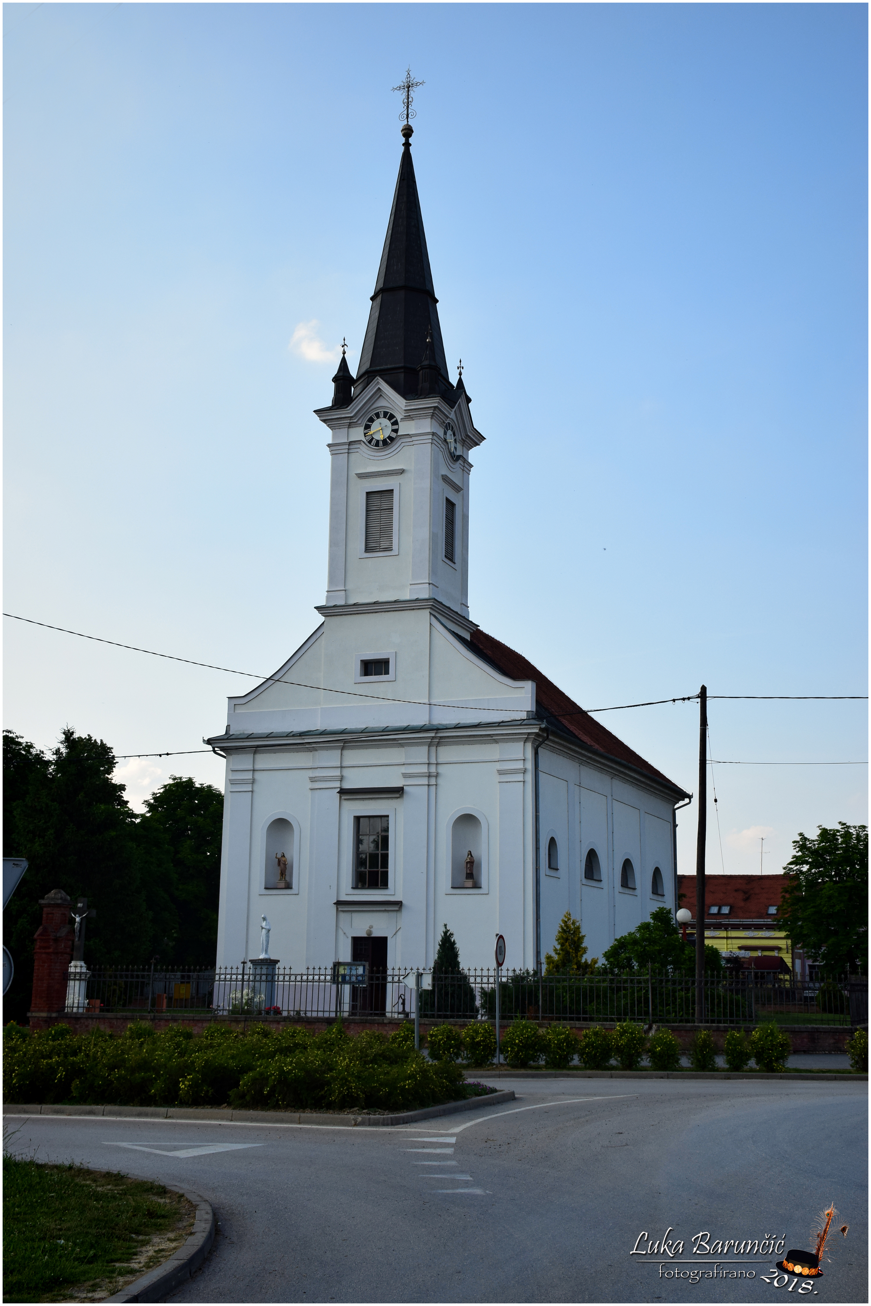 Crkva sv. Lovre Đakona i Mučenika